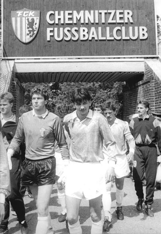 ADN-ZB-Kasper-26.5.90-pst-Karl-Marx-Stadt (Chemnitz)- Fußball-Oberliga-Abschied von der Vergangenheit auch im Fußball: als "Chemnitzer Fußballclub" betritt der einstige FC Karl-Marx-Stadt den Rasen des heimischen Dr.-Kurt-Fischer-Stadions. Neuer Name neues Glück - 1:0 gegen Magdeburg !"